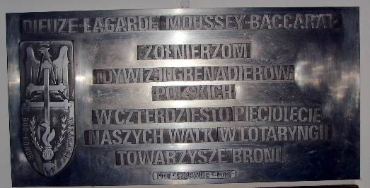 Tablica w kościele św. Andrzeja Boboli w Londynie